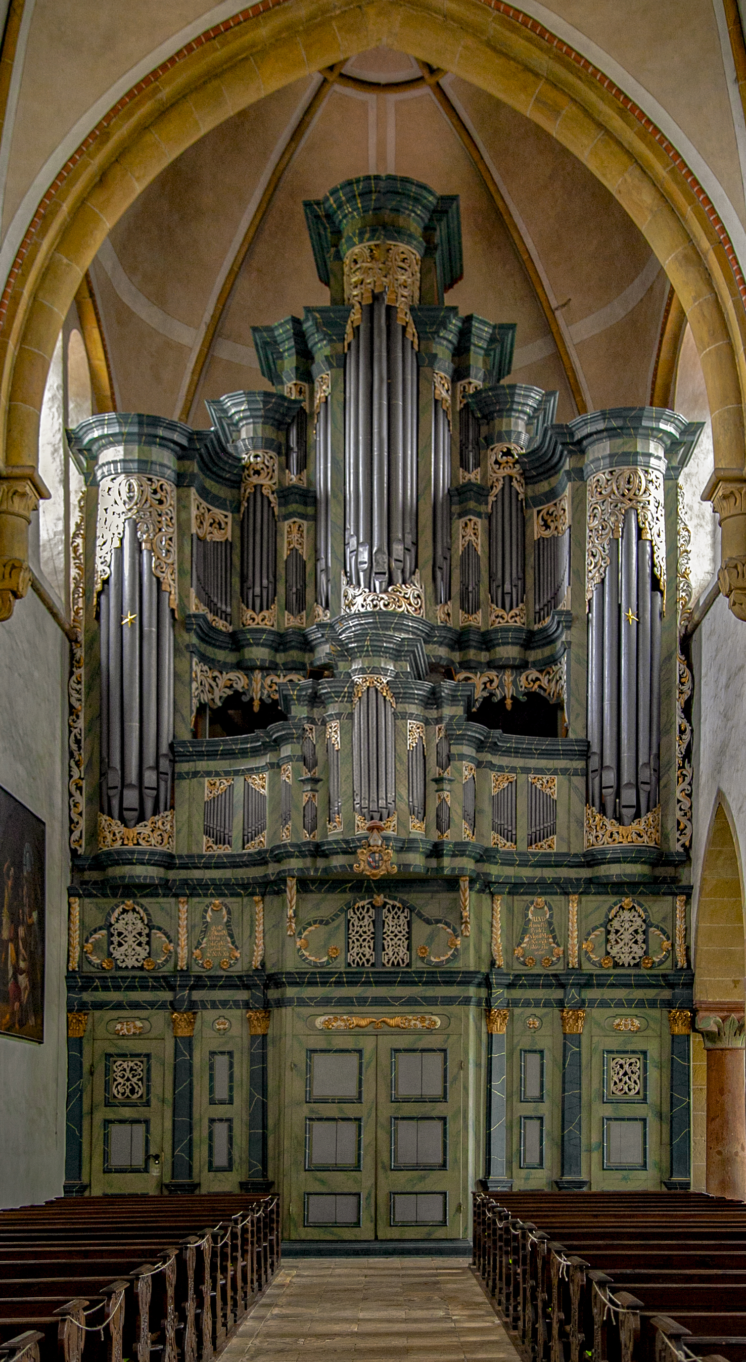 Orgel in der Kirche des Klosters Martienfeld